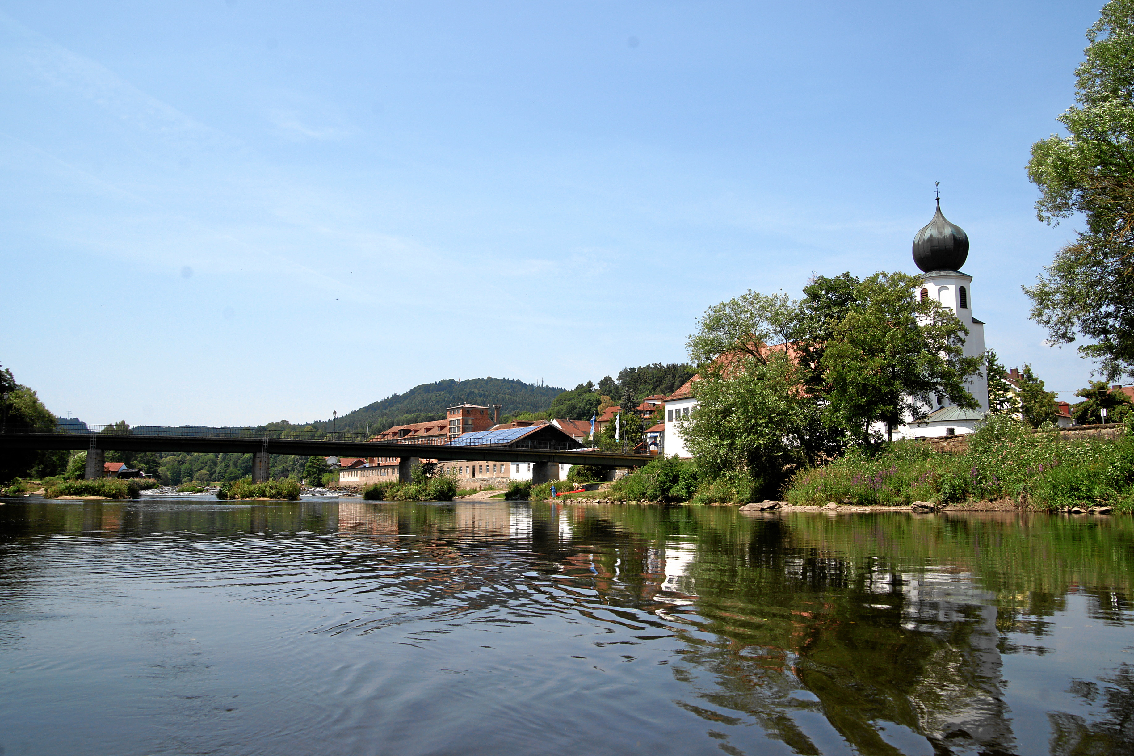 Regen bei Chamerau: Blick vom Unterwasser her